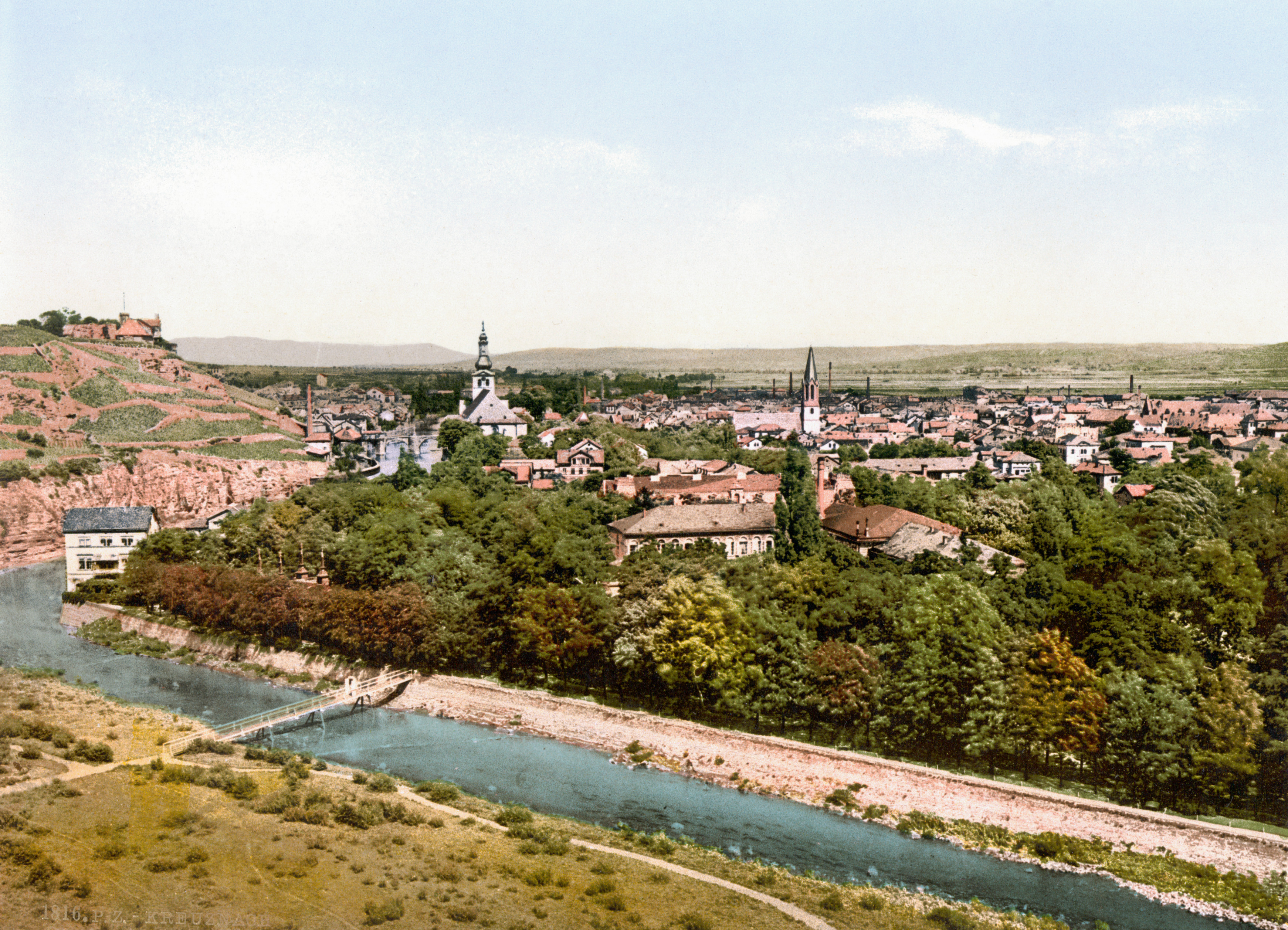 Bad Kreuznach